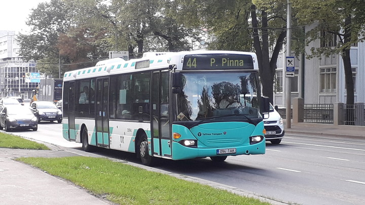 Bussiliin. 44 sõitmas mööda Narva maanteed